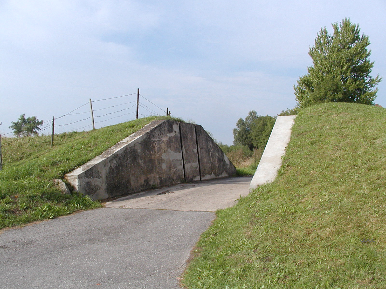 Ein Druchlass im Deich auch Stöpe genannt